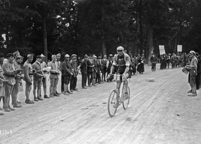 12-7-23, Briançon, Francis Pélissier participant au Tour de France cycliste